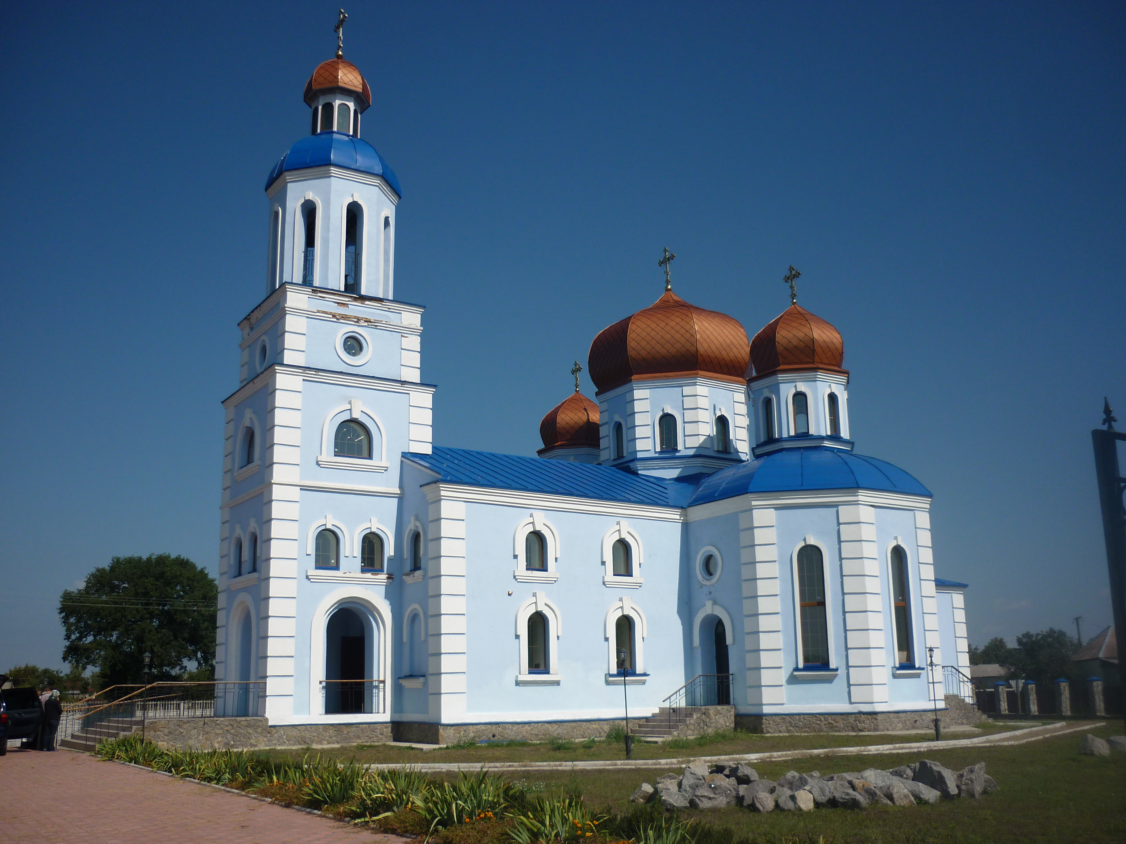 Церква у селі Будище Черкаського району